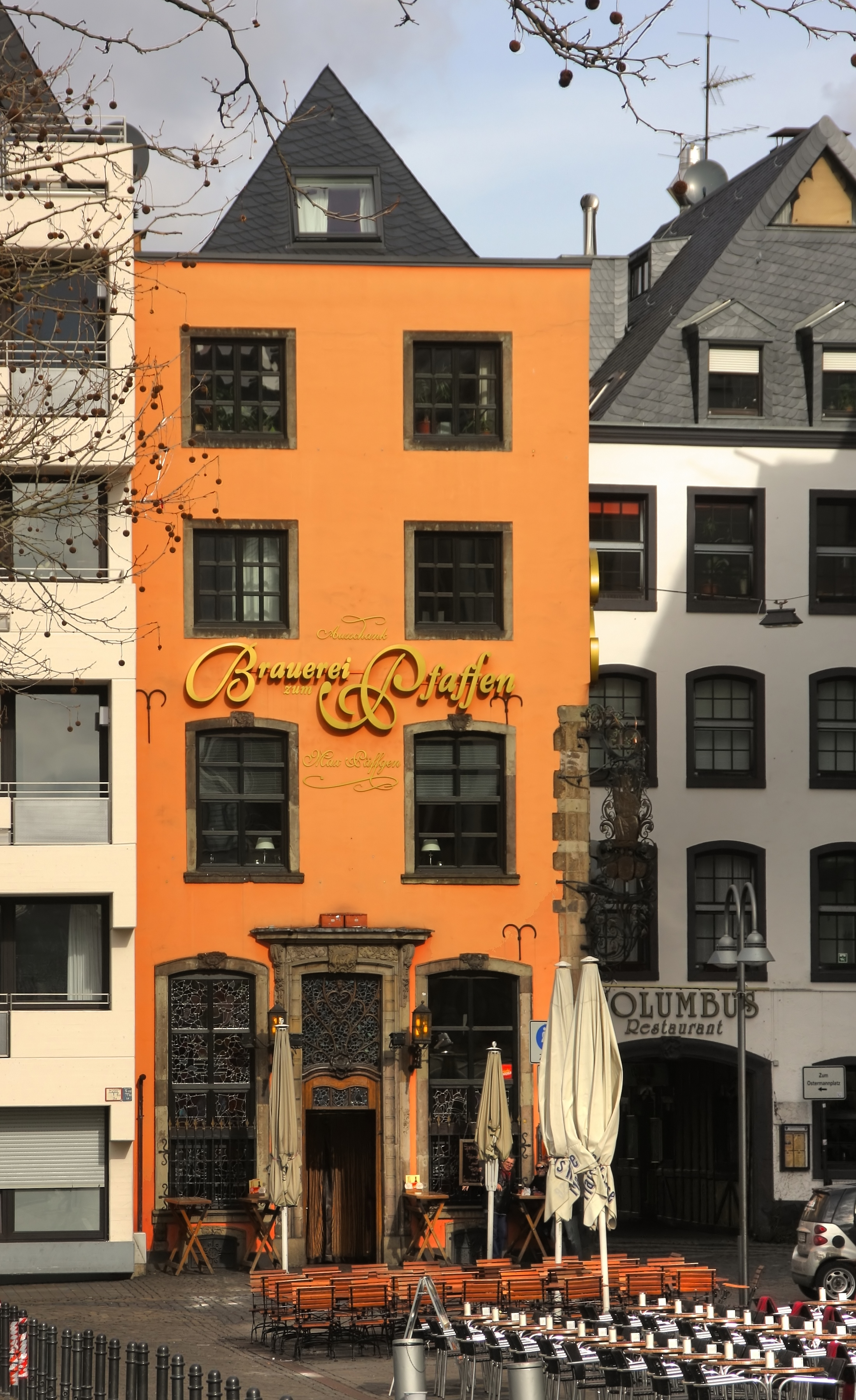 Ausschank der Brauerei zum Pfaffen - Max Päffgen, Heumarkt 62, 50677 Köln. Ansicht vom Heumarkt. Die eigentliche Brauerei befindet sich in Lohmar.